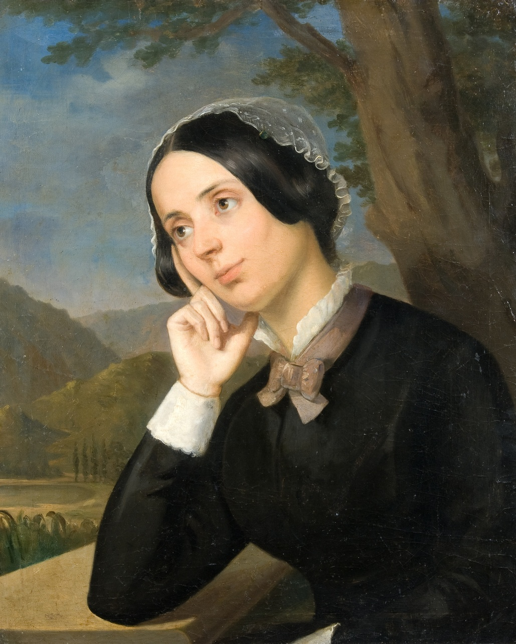 Constantin Daniel Rosenthal - Portret de femeie / Maria Rosetti, ulei pe placă de ardezie sintetică, Muzeul Naţional de Artă al României, Bucureşti